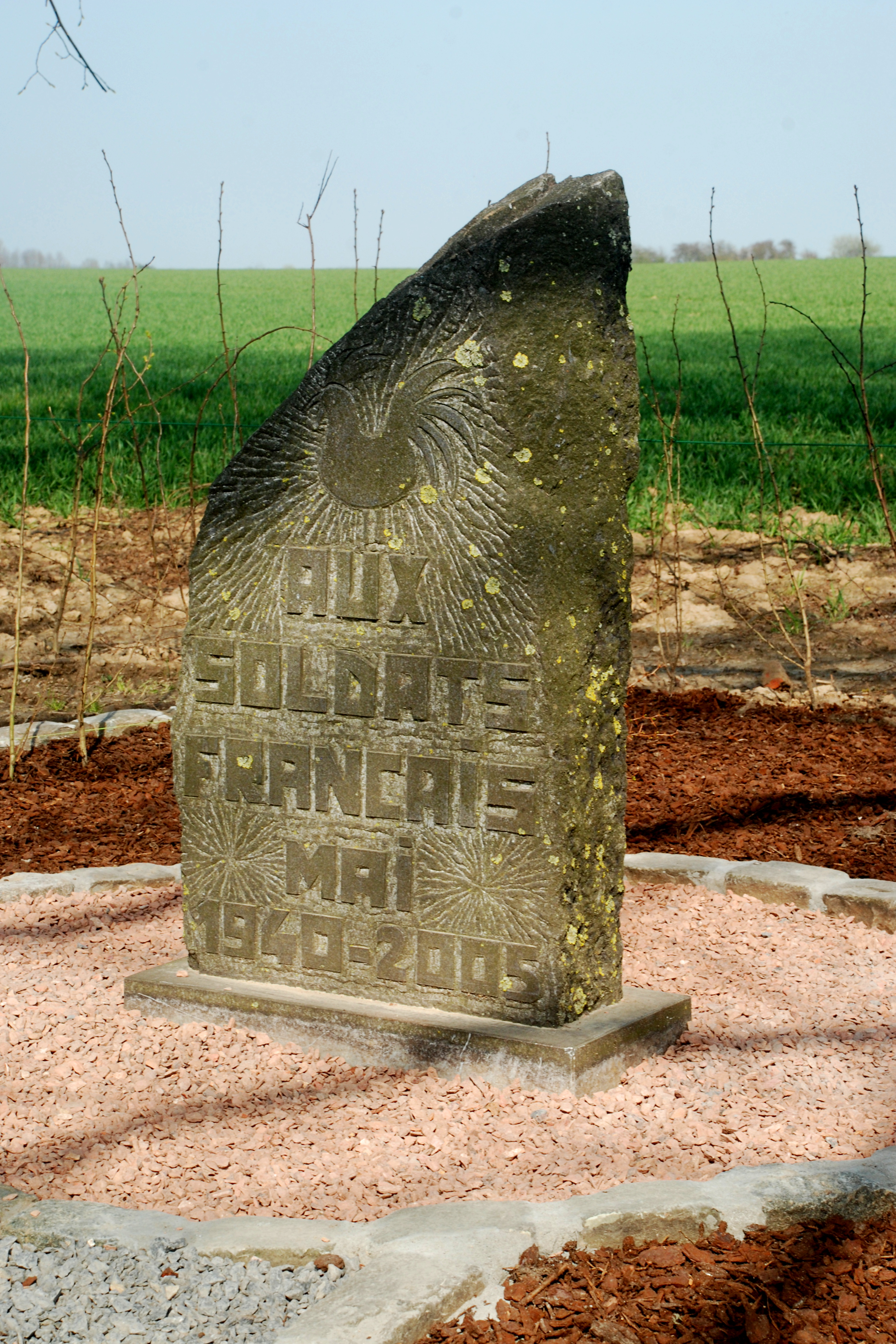 Belgique - Brabant wallon - Court-Saint-Étienne - Arbre de la justice